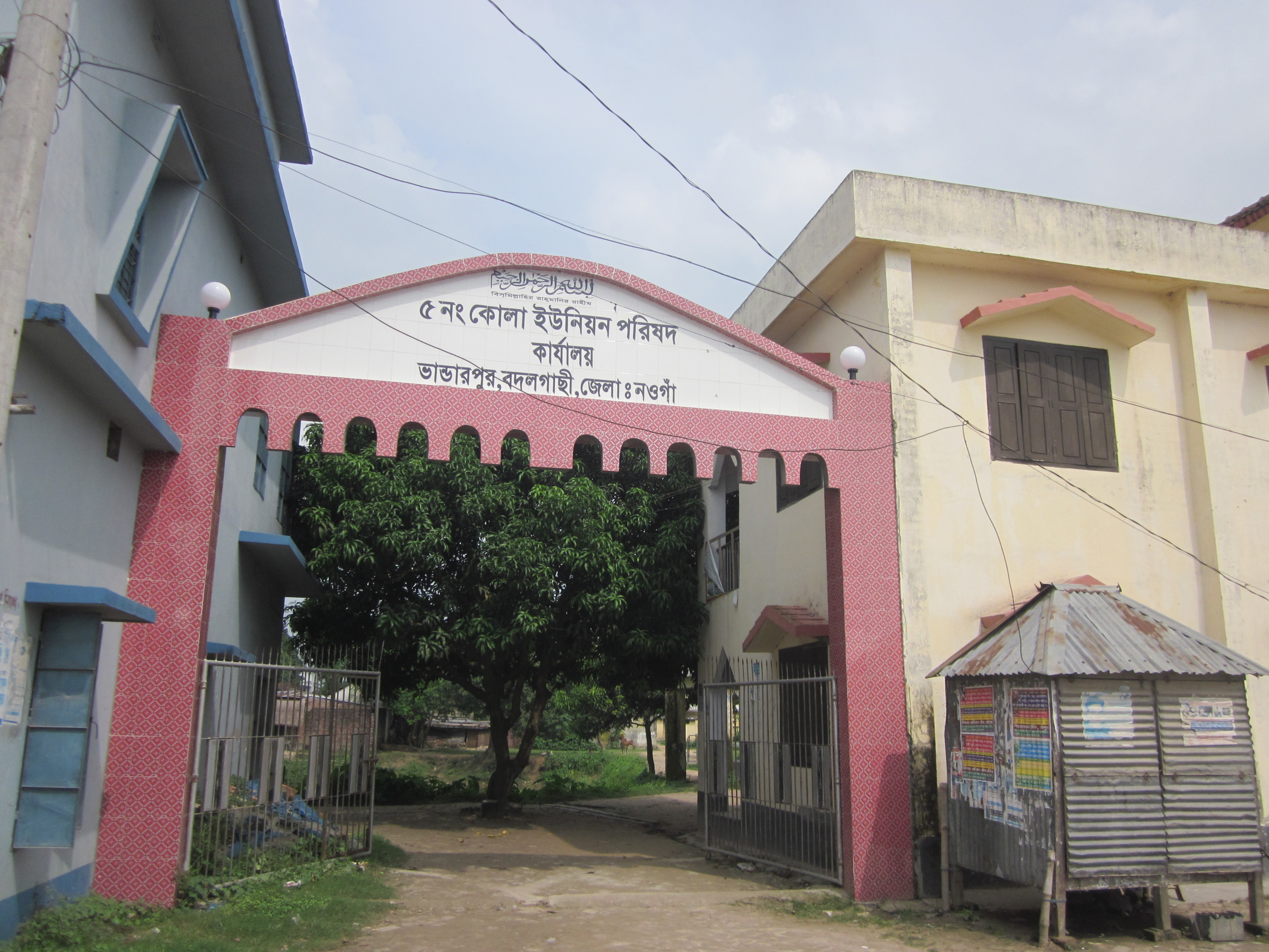 Kola Union Parishad, Bhandarpur-Kola Road, Badalgacchi, Naogaon